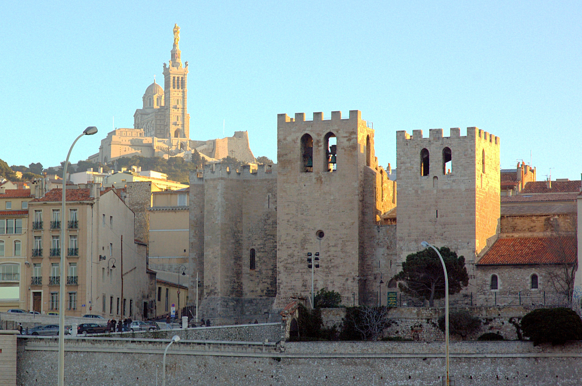 Марсель. Аббатство святого Виктора и базилика Нотр-Дам-де-ля-Гард.